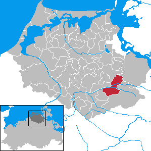 Grimmen in Mecklenburg-Vorpommern - District Nordvorpommern